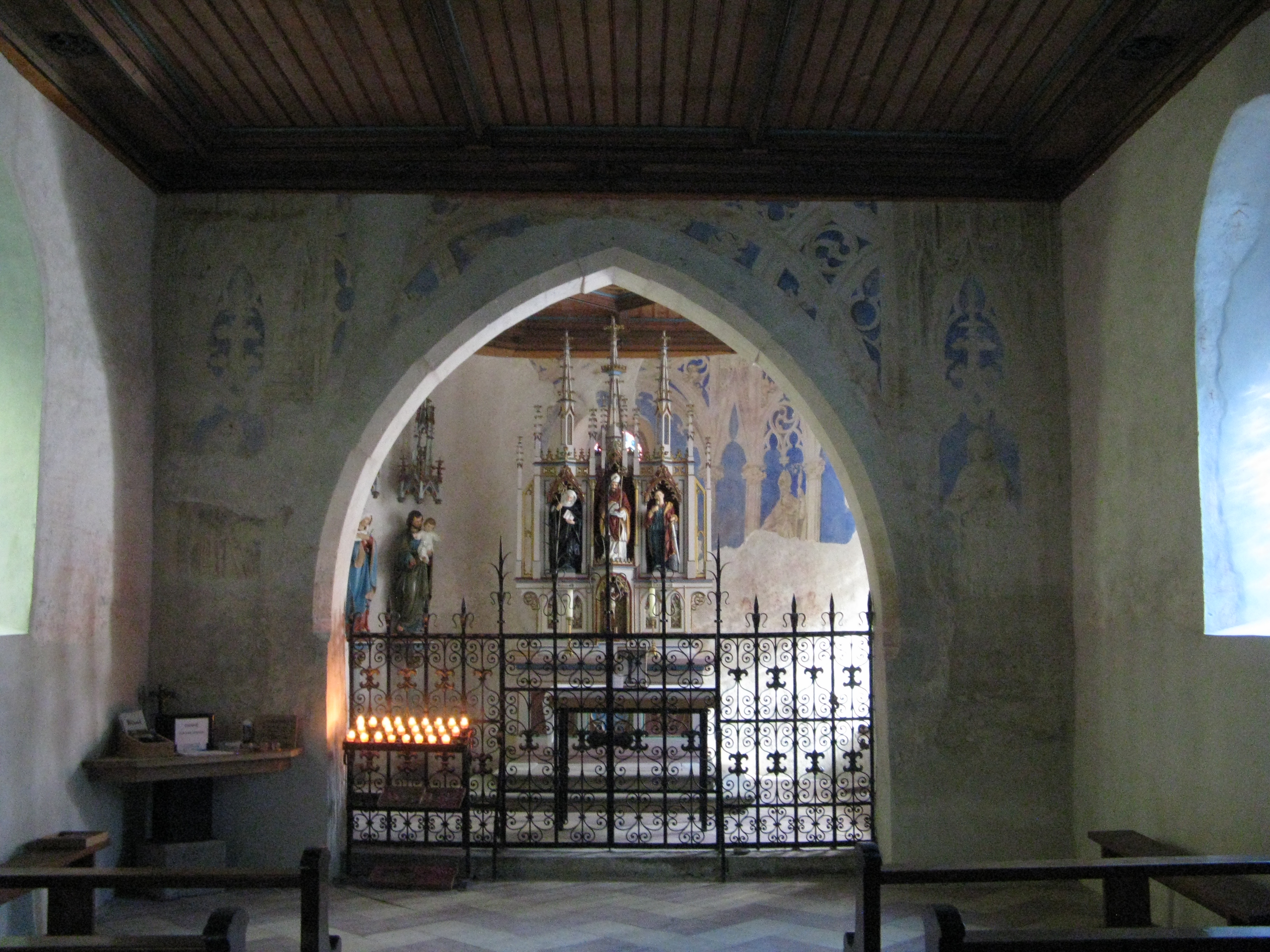 Kapelle hl. Ulrich